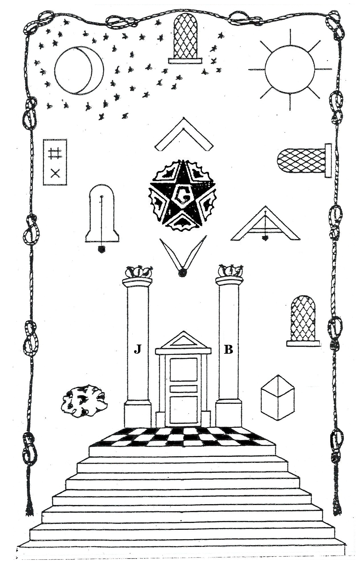 Tableau de loge de compagnon selon une reconstitution personnelle et issue du Régulateur du Maçon édité en 1801